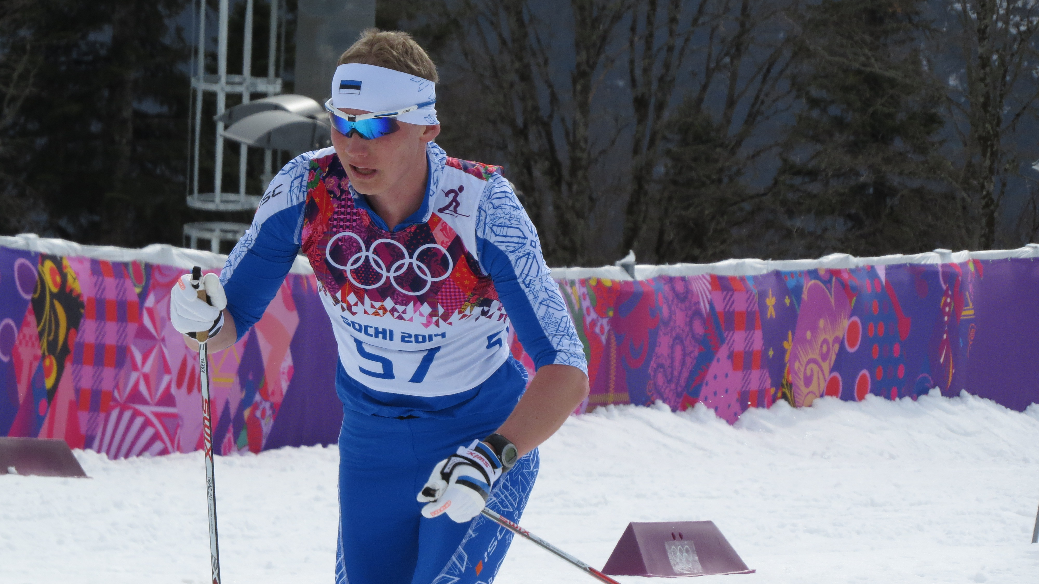 Лыжные гонки на зимних Олимпийских играх 2014 — 15 км классическим стилем (мужчины)